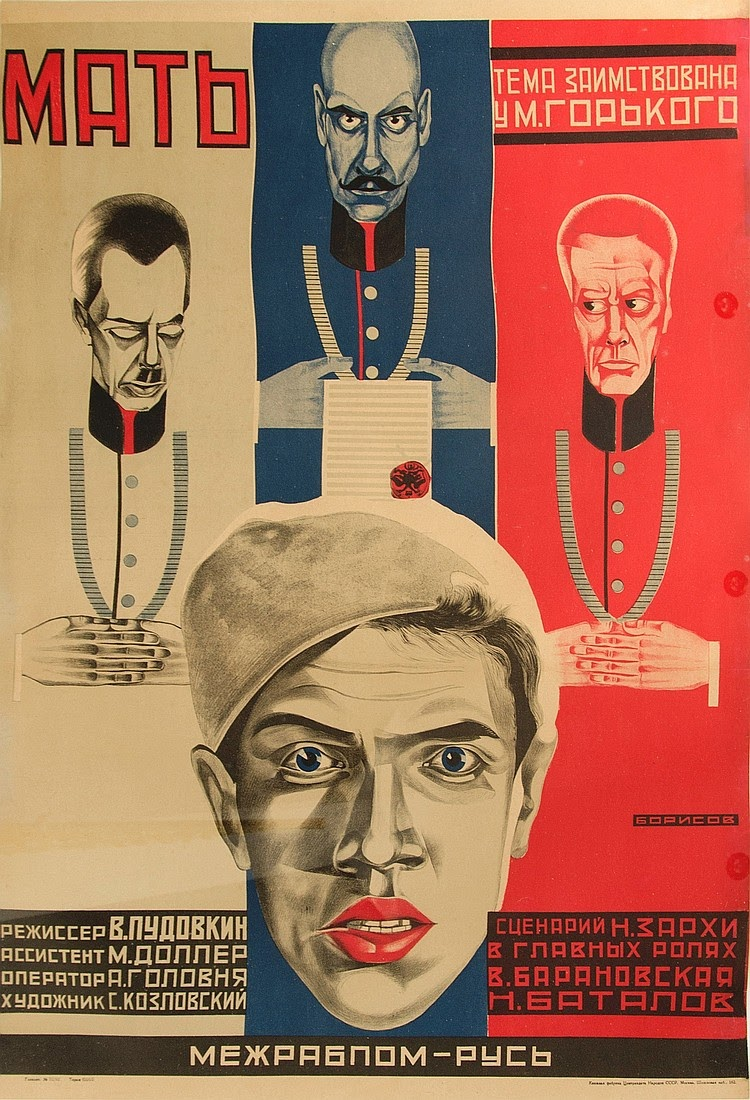 Плакат к советскому художественному фильму «Мать» (Производство Межрабпом-Русь, реж. Всеволод Пудовкин). Москва: Издание Межрабпом-Русь, 1926. Хромолитография, 107×70 см.